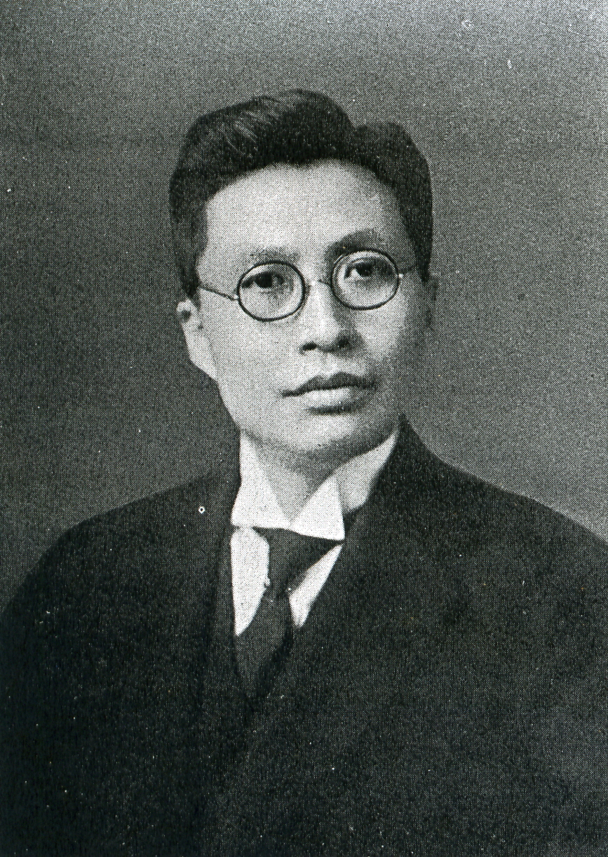 この写真は、牧野良三（1885-1961）の写真です。